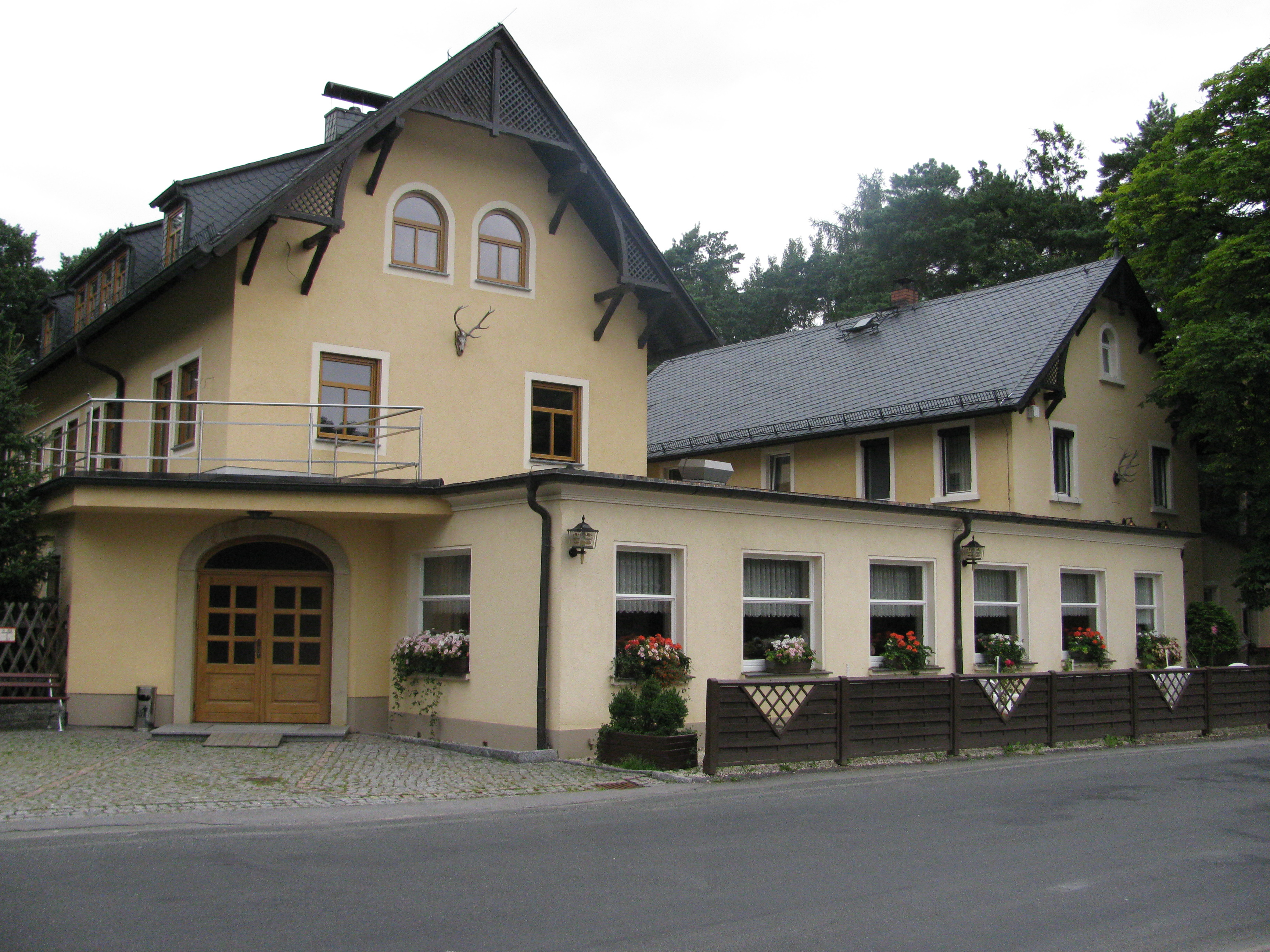 Mistschänke in Steinbach, Gemeinde Moritzburg, Mistschänkenweg 10, Sachsen